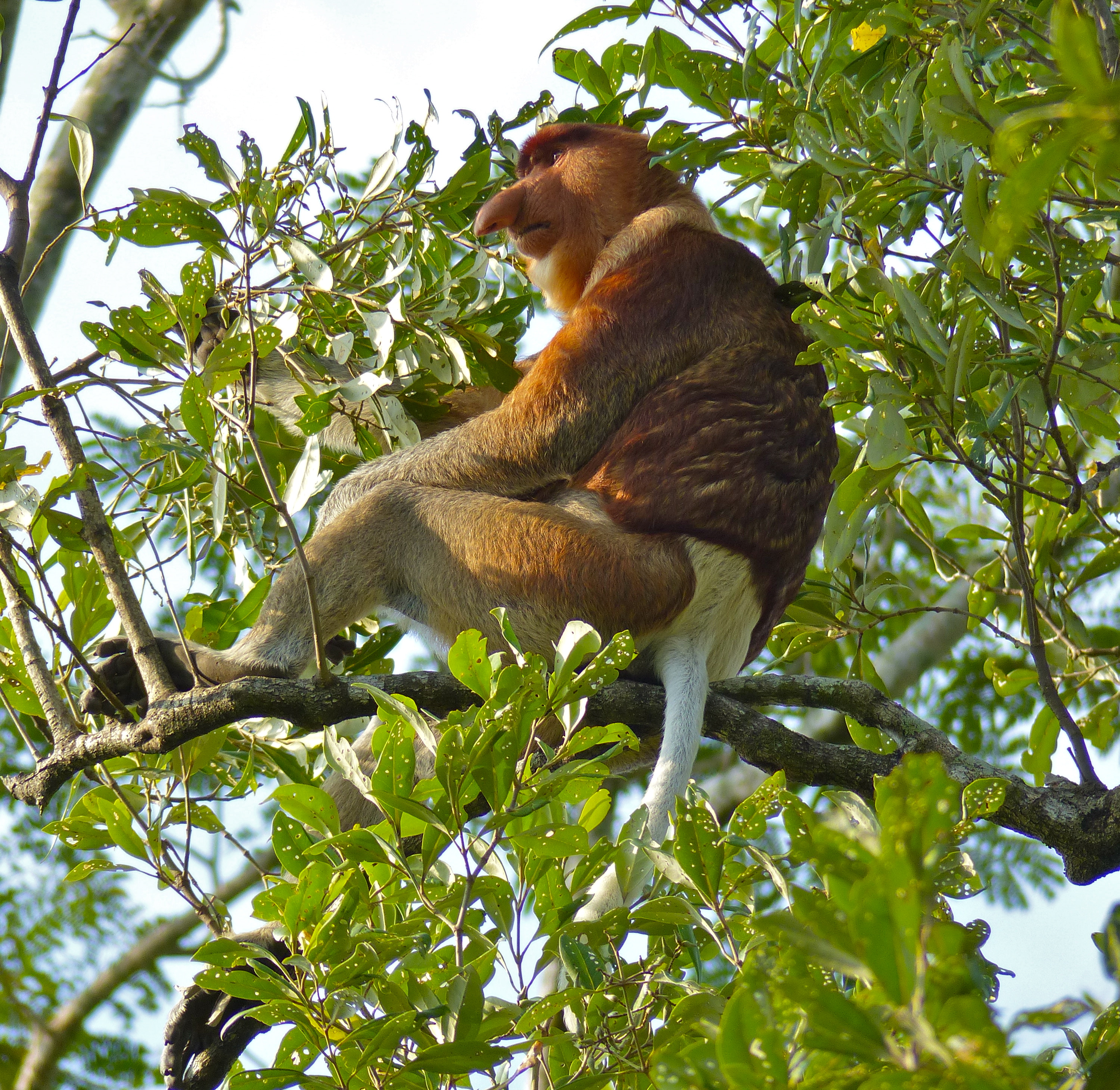 Bako NP, Sarawak, MALAYSIA